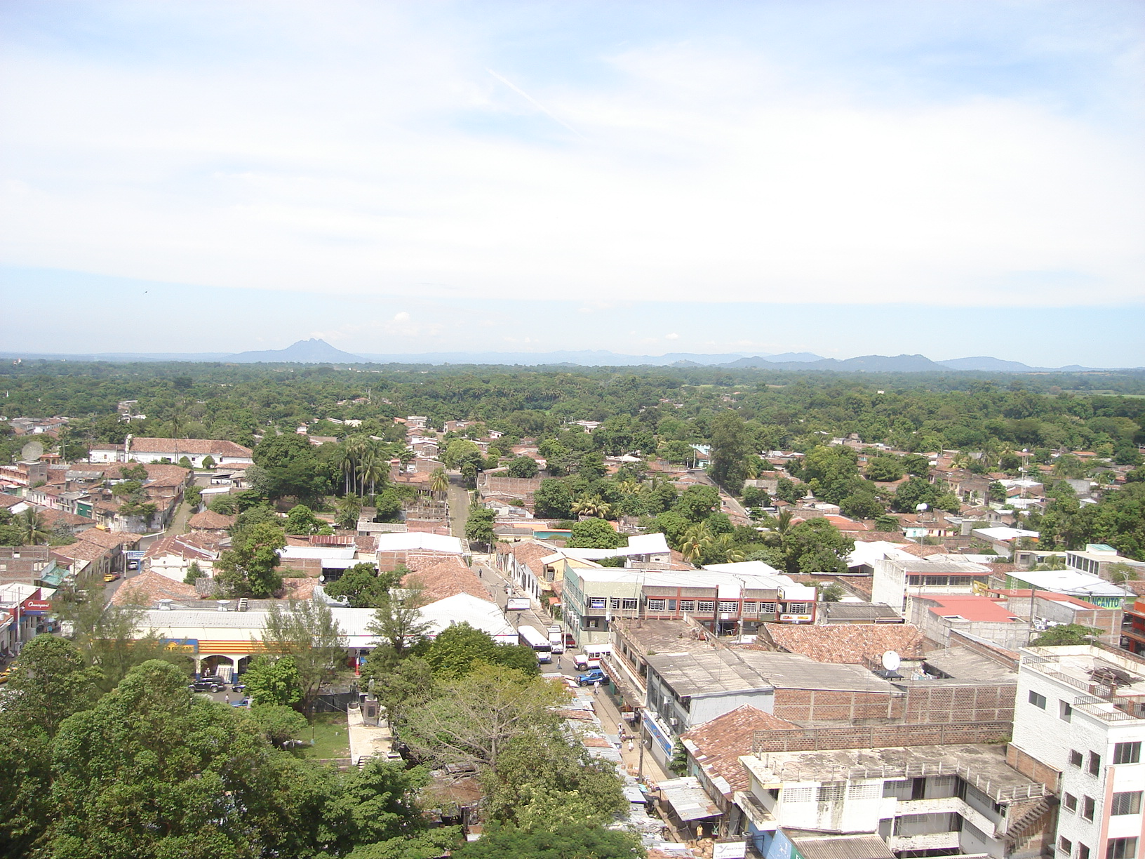 Vista aérea de la ciudad de zacatecoluca